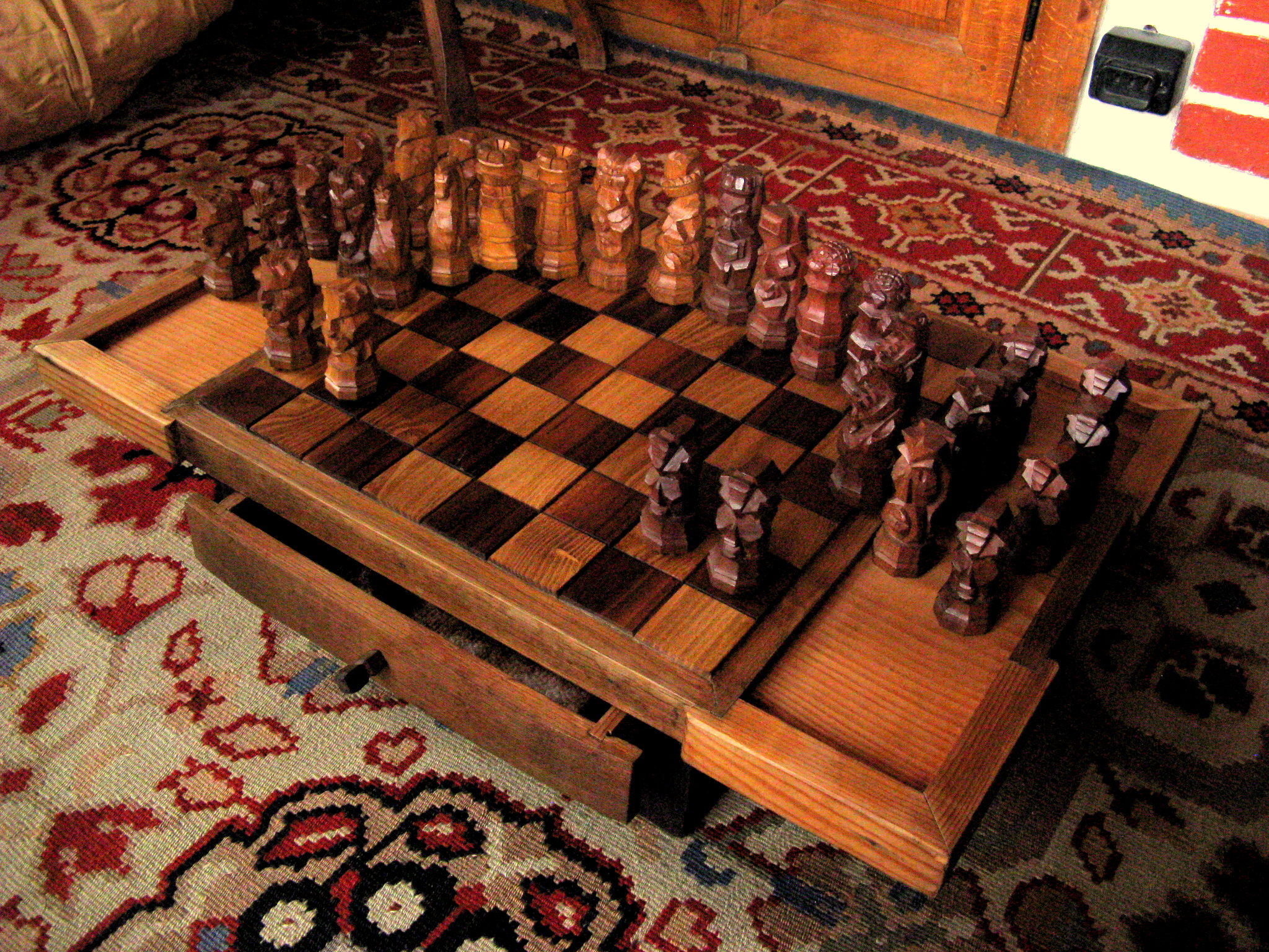 Шах.Дърво.Слива,Акация,Ясен,Дъб,Иглолистен.